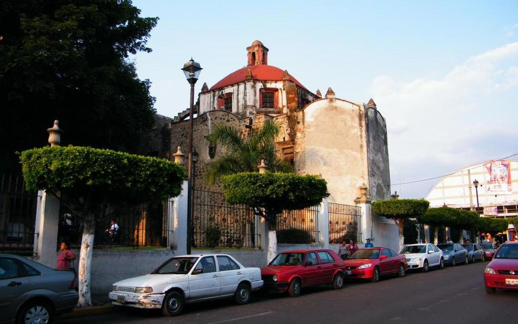 Iglesia y Ex-Convento Franciscano San Diego de Alcalá, Cuautla de Morelos,México